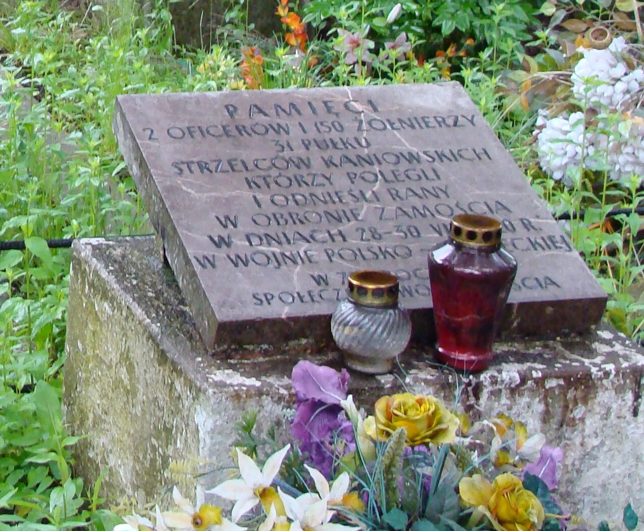 Upamiętnienie poległych w wojnie polsko-bolszewickiej podczas obrony Zamościa. Cmentarz przy ul. PeOWiaków w Zamościu